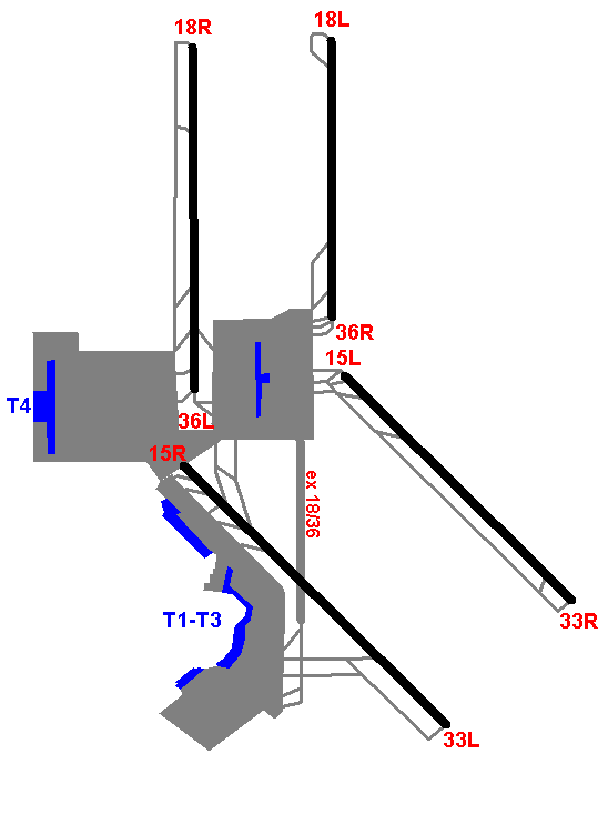 Layout des Flughafens Madrid-Barajas, Stand November 2007